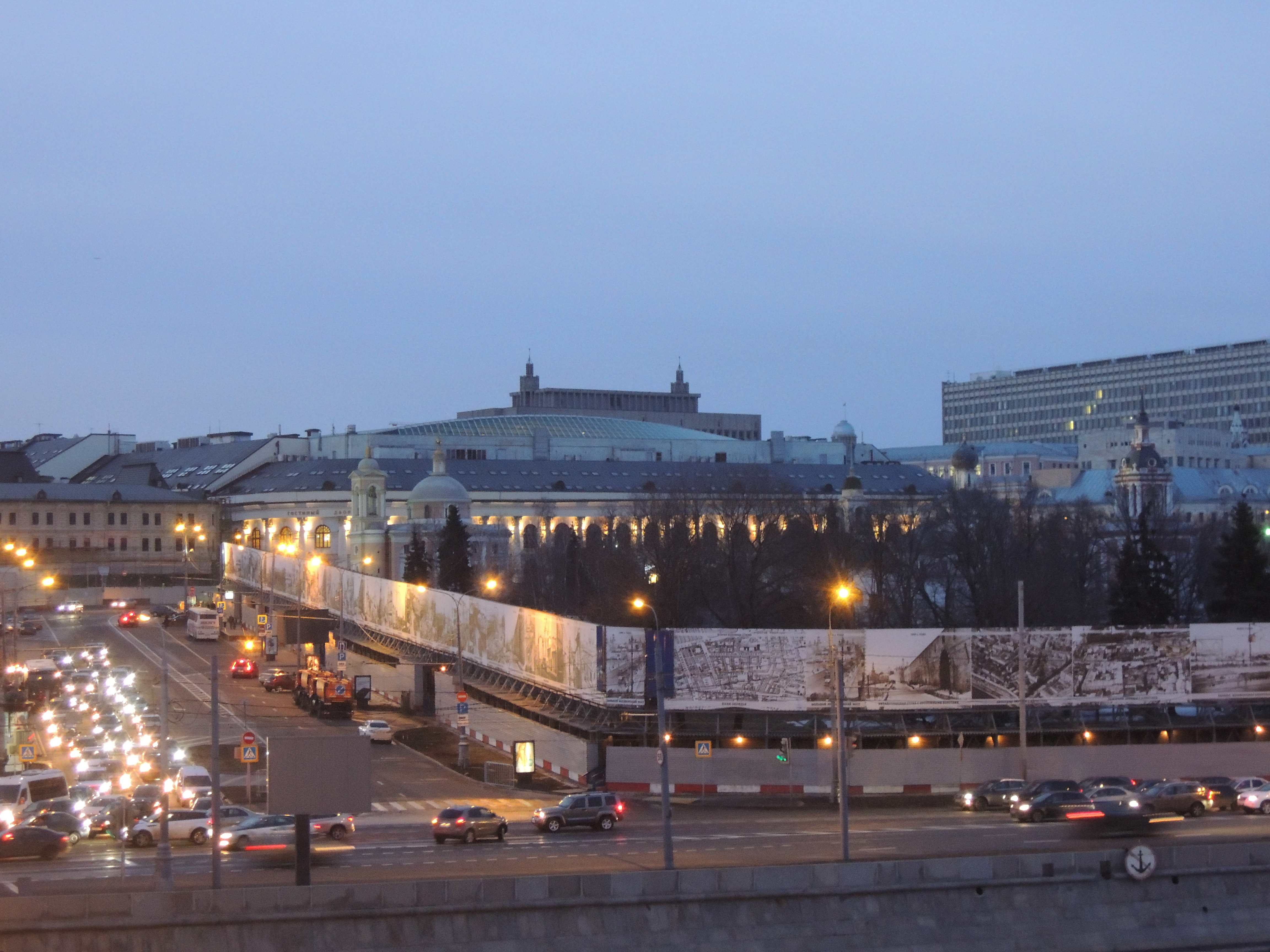 Огороженное место снесенной гостиницы "Россия"